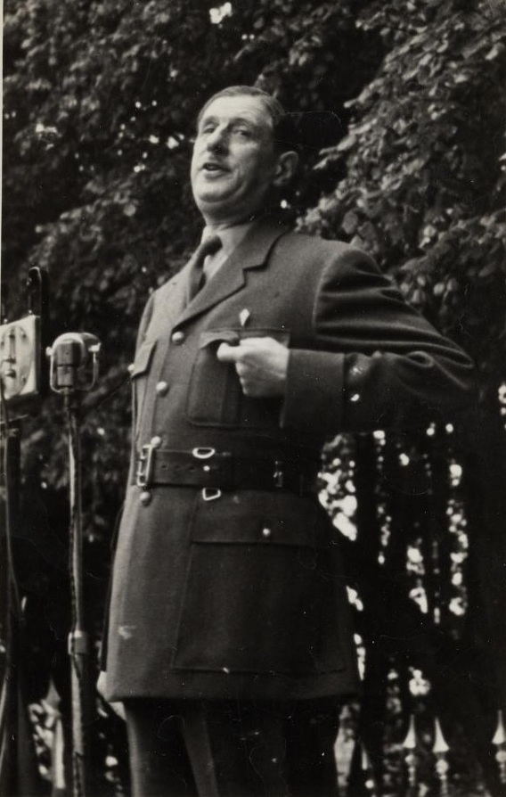 Charles de Gaulle prononçant le second discours de Bayeux (16 juin 1946).